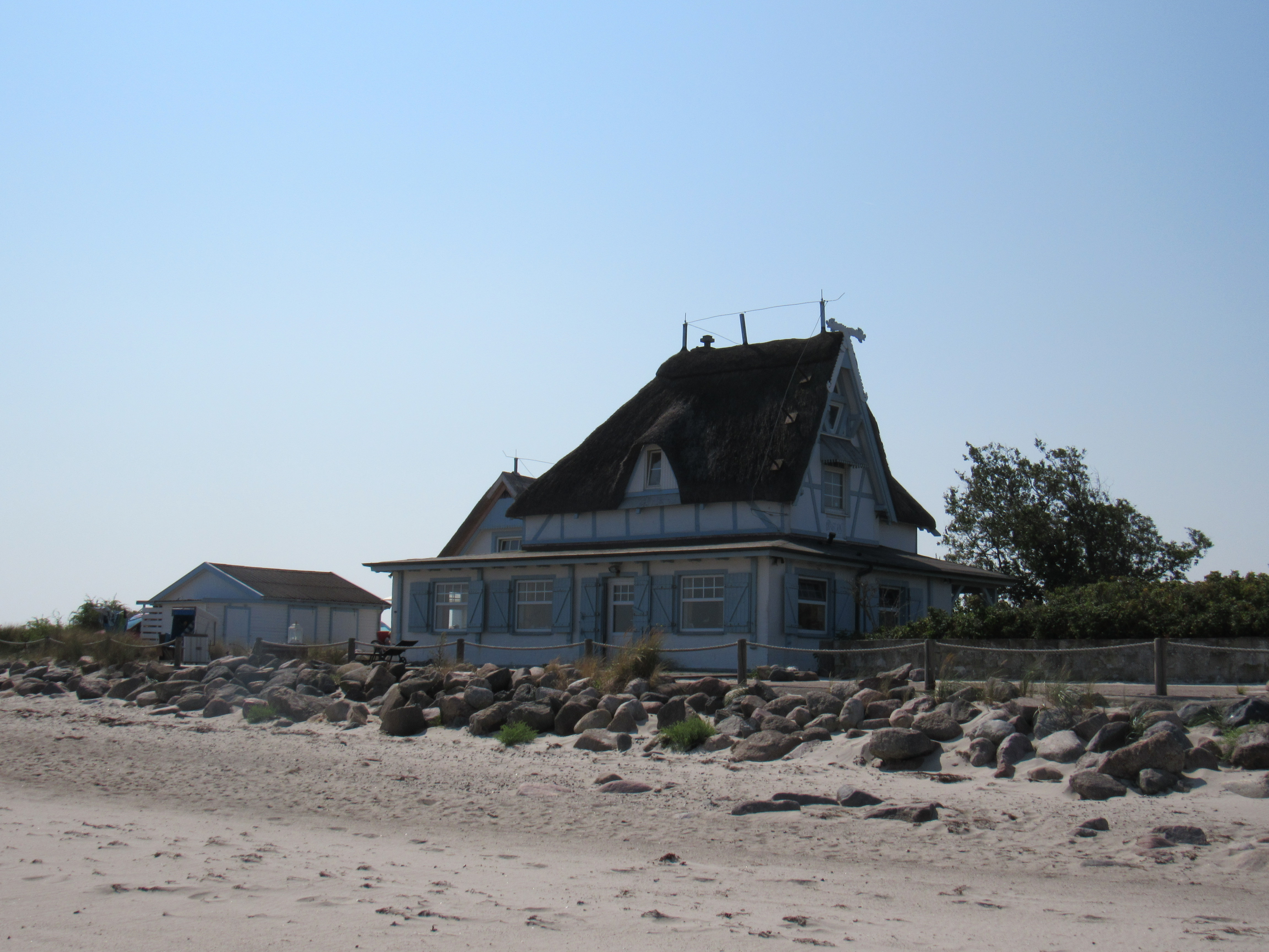 Heiligenhafen, Graswarder im Juli 2018